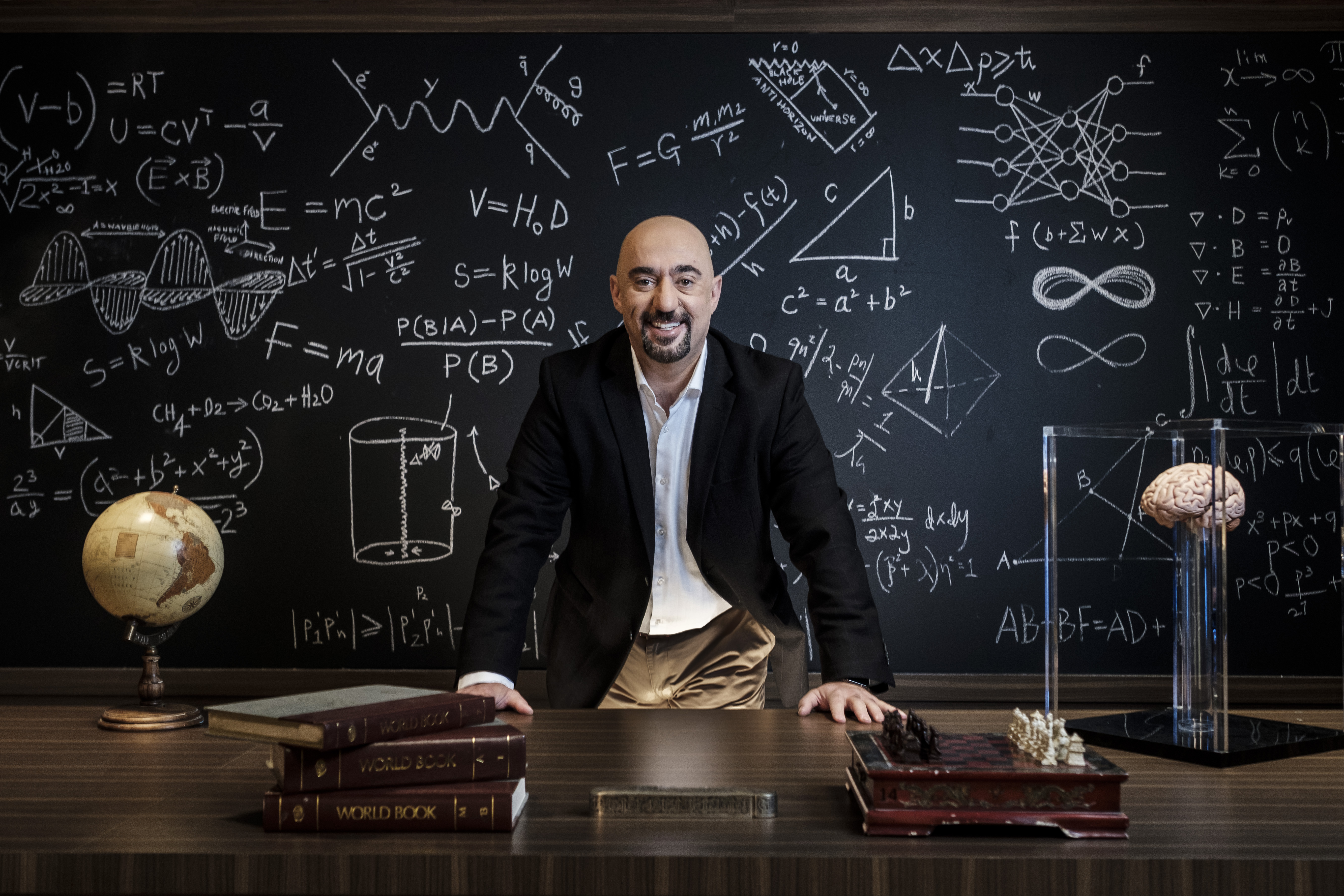 محمد قاسم يقدم برنامج العالمون على قناة أبوظبي